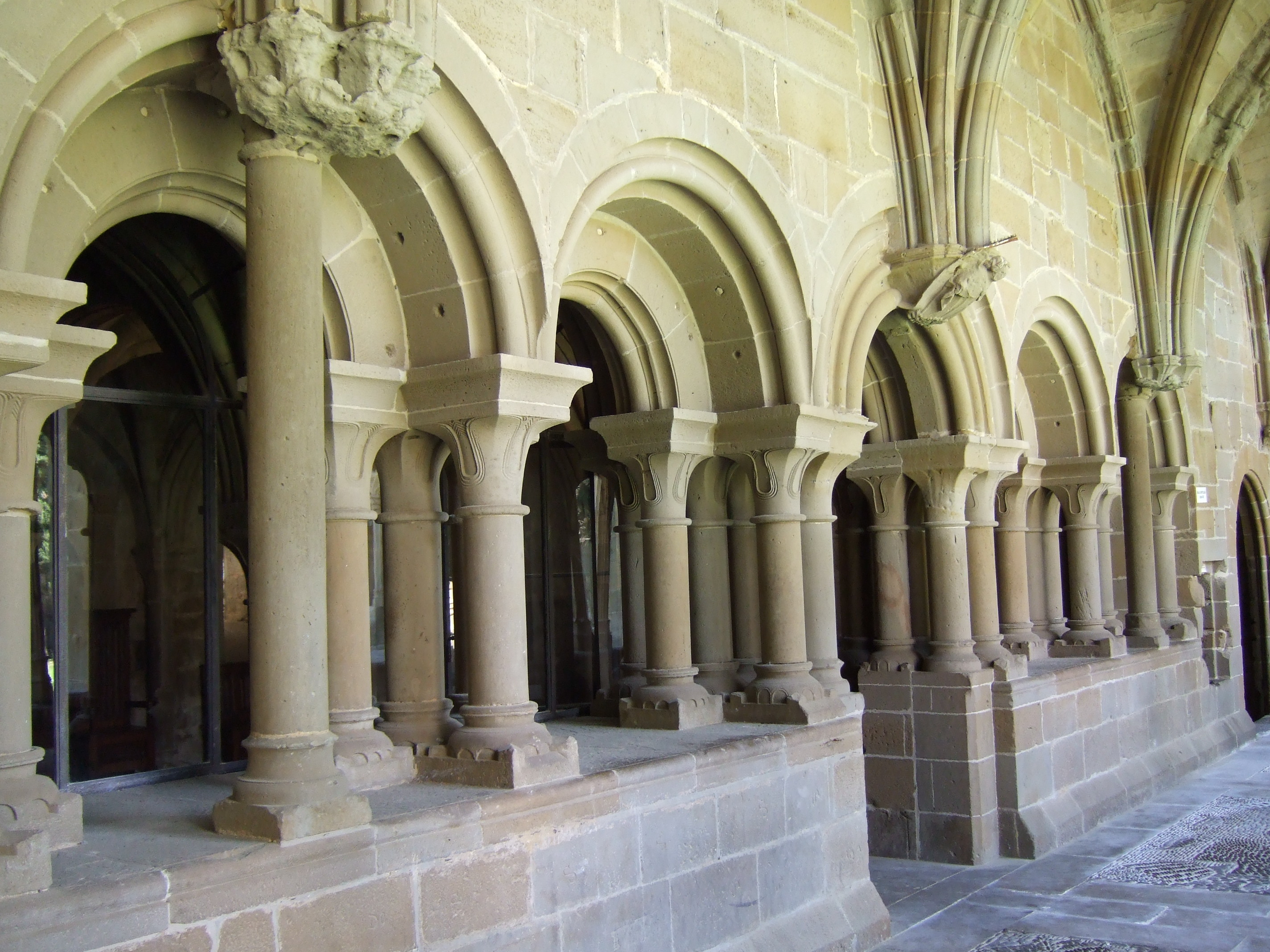 Monasterio de la Oliva - Entrada a la sala capitular desde el claustro